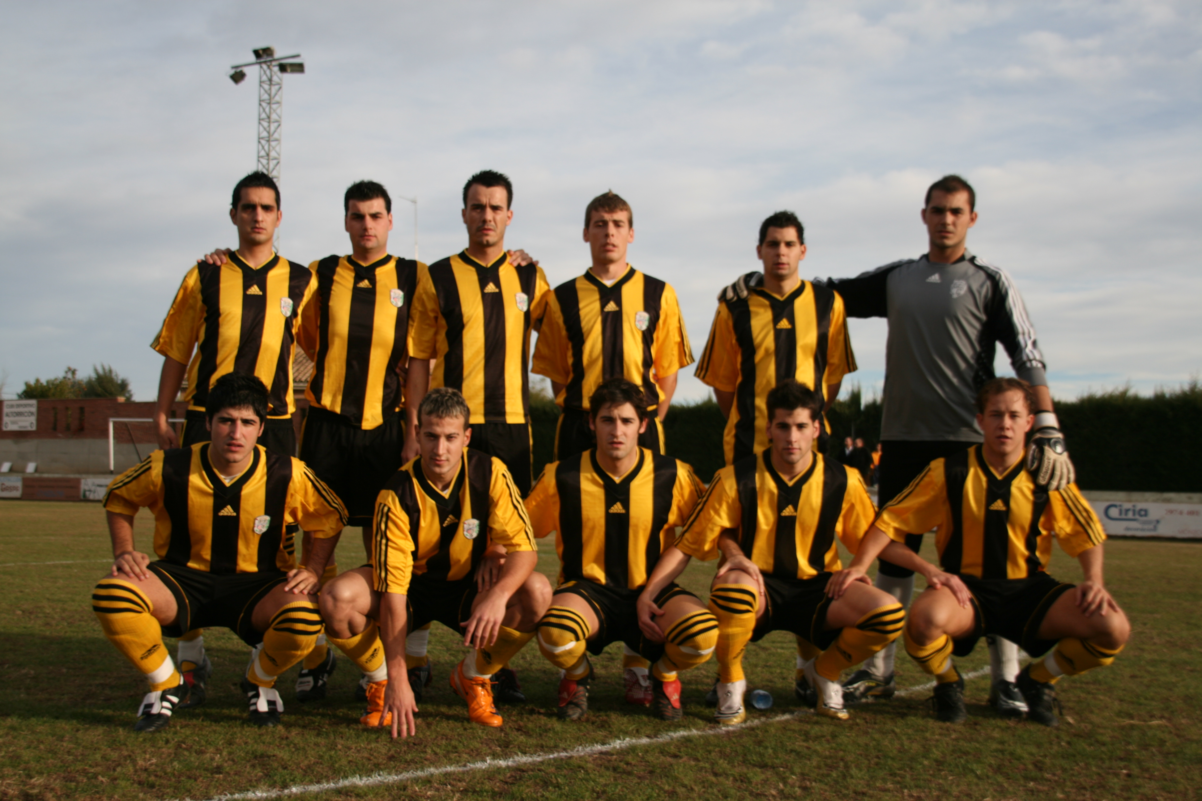 Caspe (Altorricón 1 - Caspe 1) (23-11-2008))